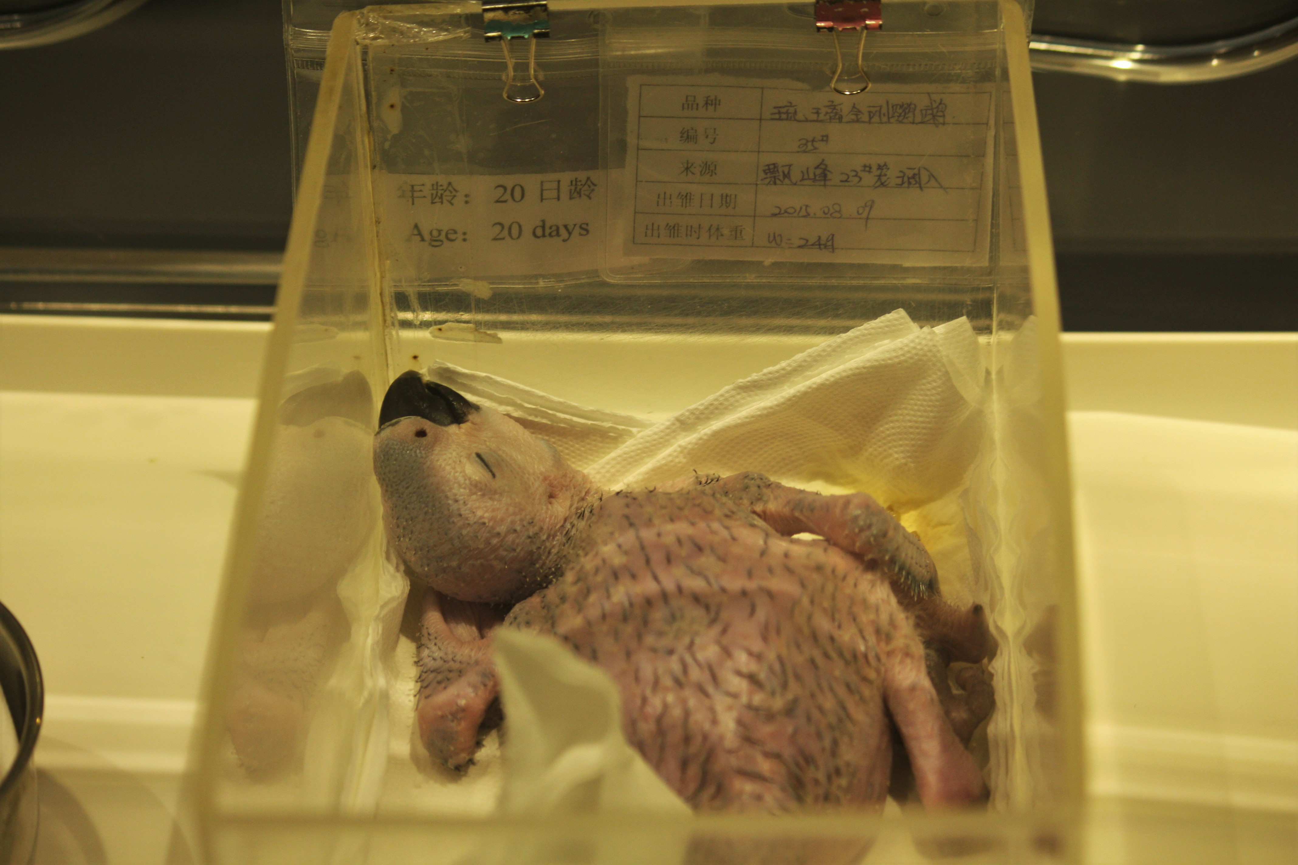 Gelbbrustaraküken (Ara ararauna), 20 Tage alt, Zoo Guangzhou